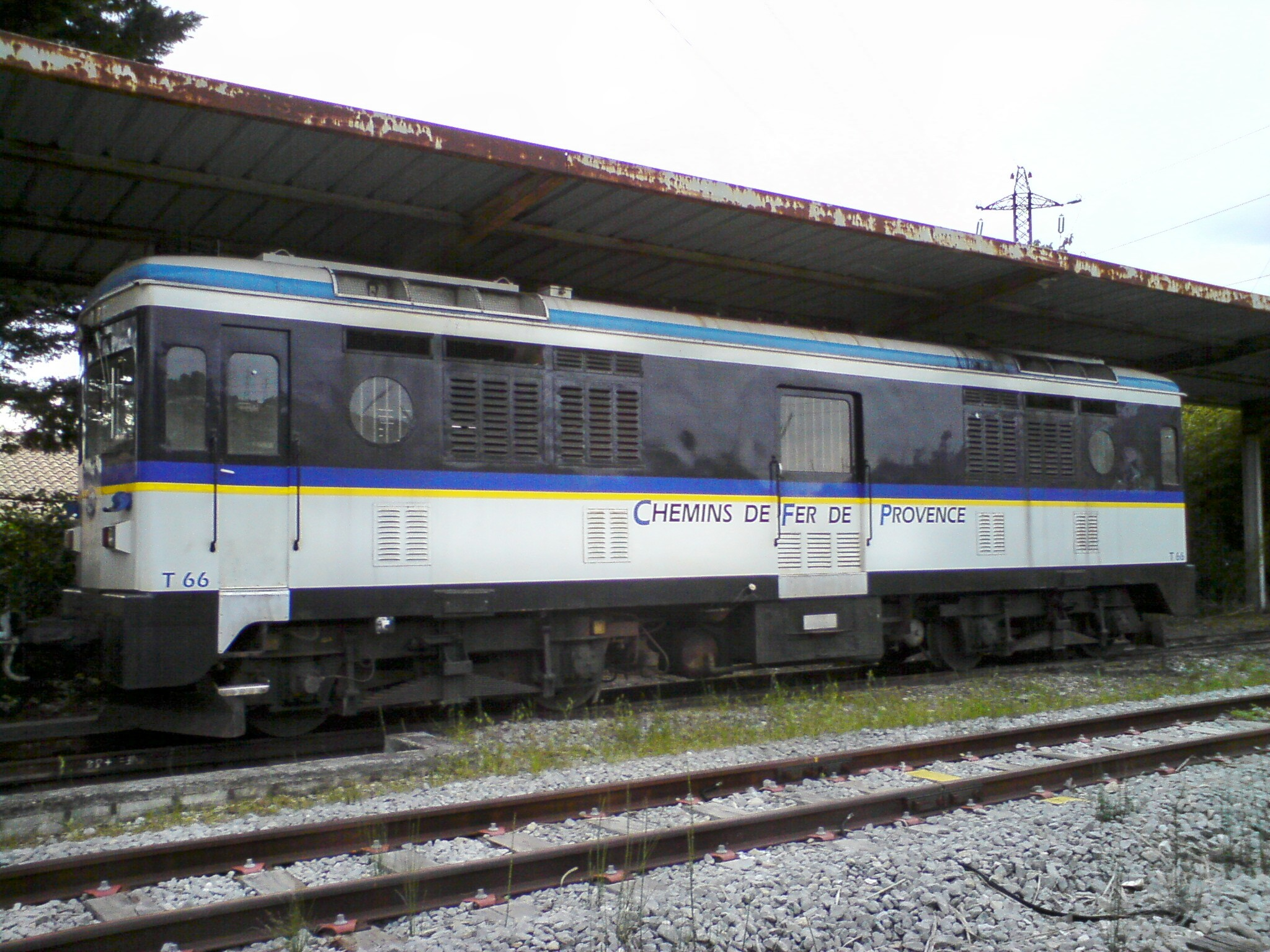 Locomotive diesel Brissoneau & Lotz des Chemins de fer de Provence (1951, pour voie métrique), photographiée aux ateliers de Nice-Lingostière